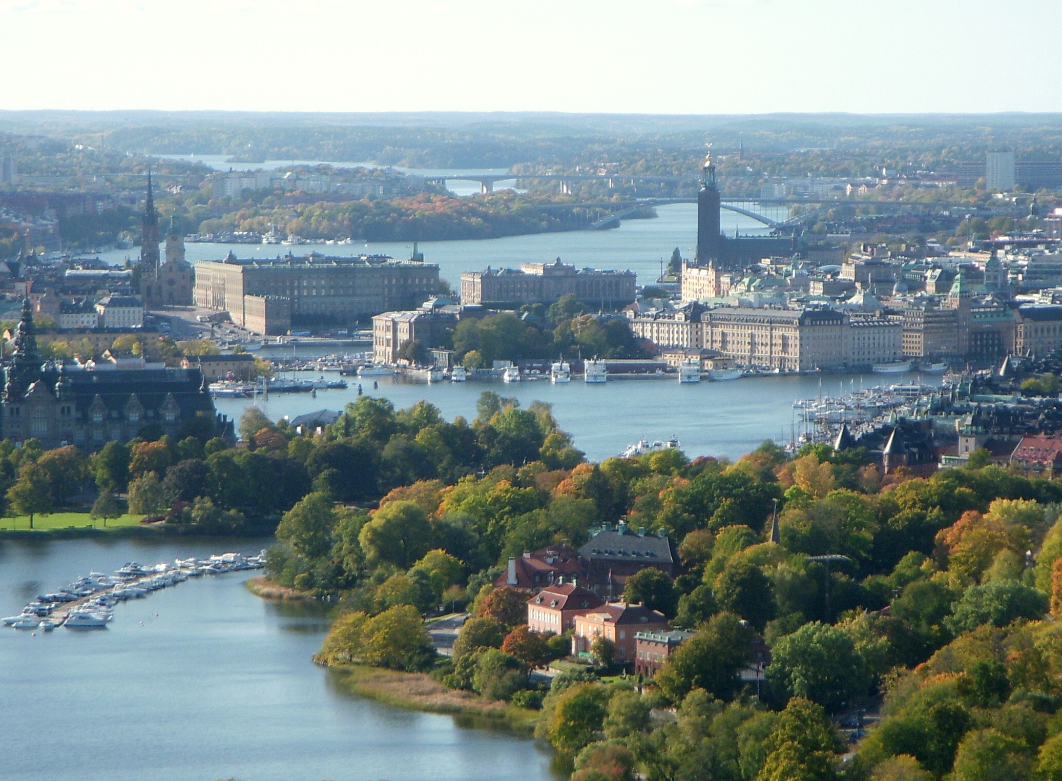 Utsikt över Stockholm och Diplomatstaden